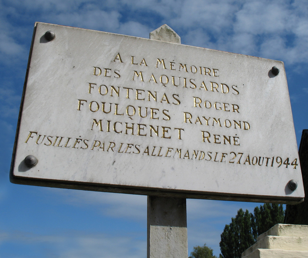 Plaque à la mémoire des martyrs de Ligueil, Indre-et-Loire, France